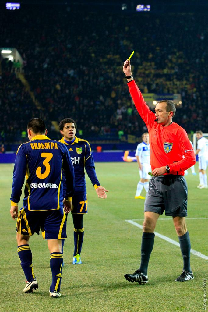 Металлист Харьков - Динамо Киев